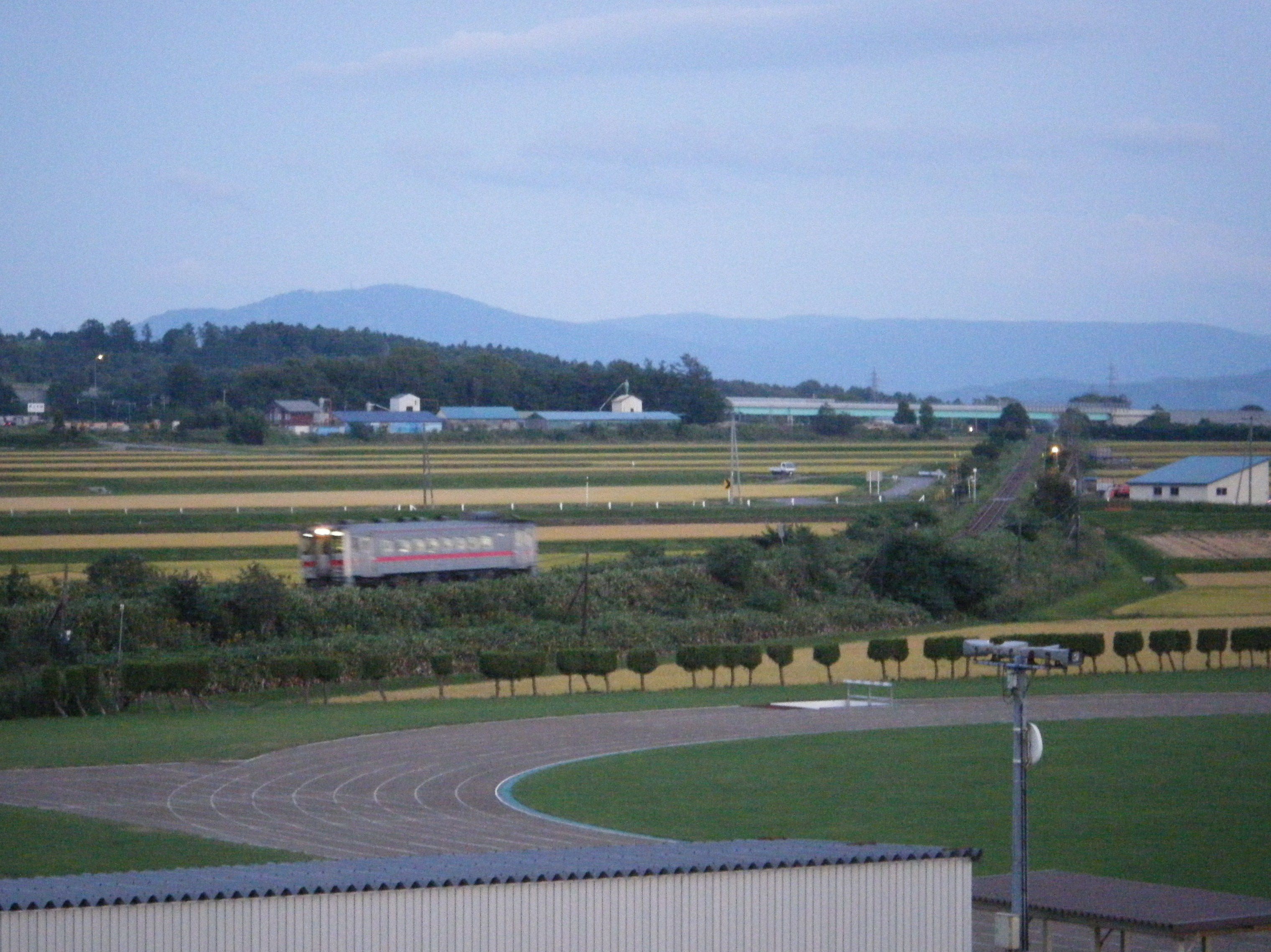 留萌本線。秩父別 - 北一已間。写真は留萌行き普通列車。